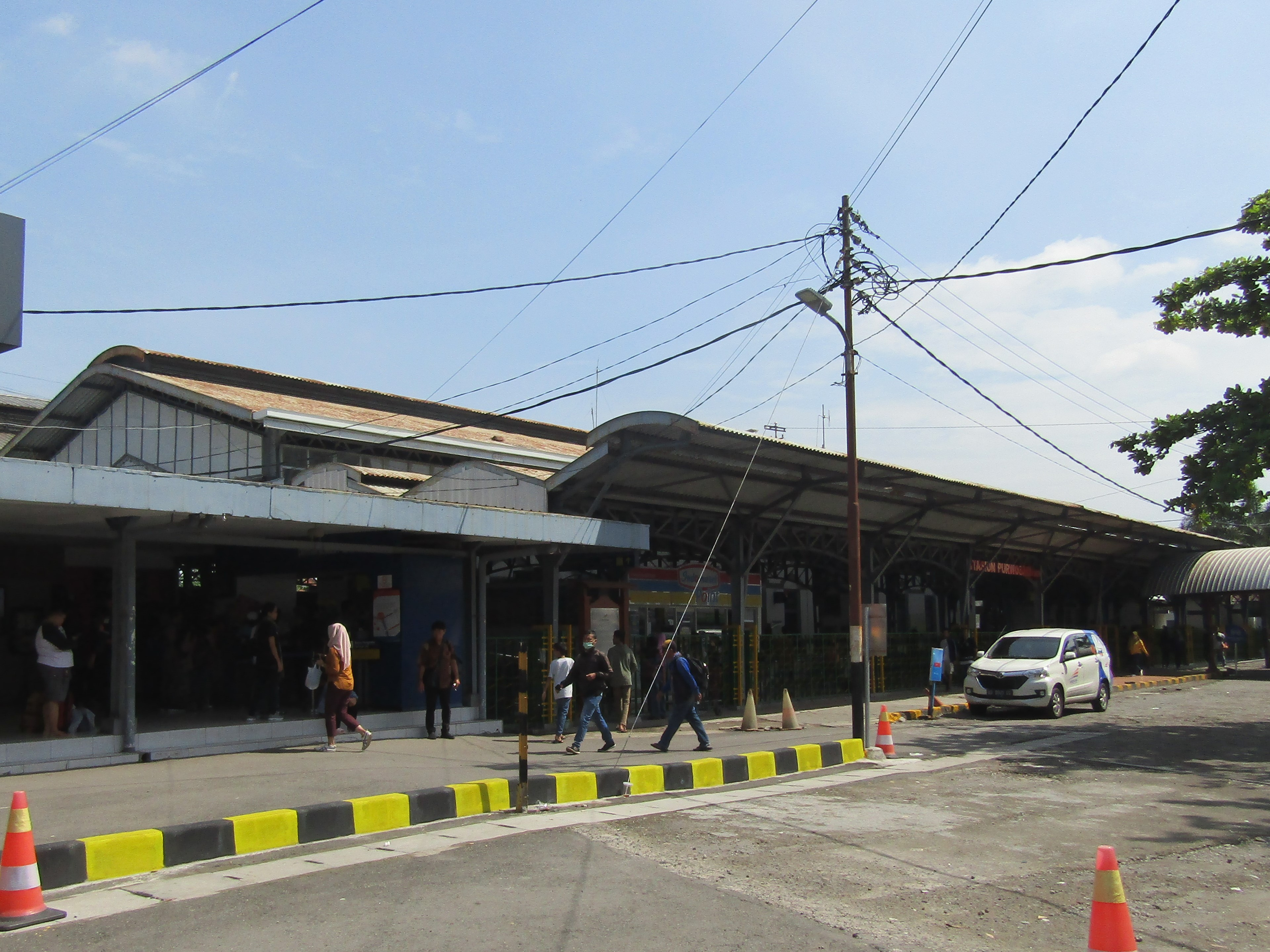 Stasiun Purwosari, 2020